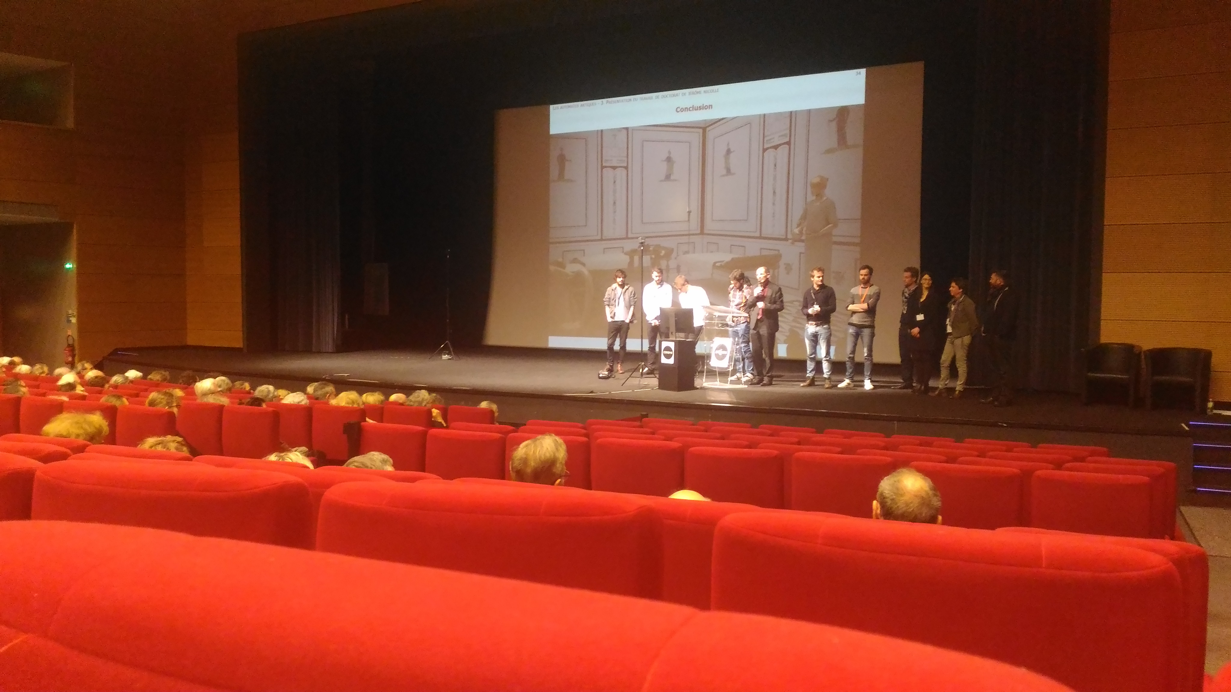 Nocturne plan de Rome